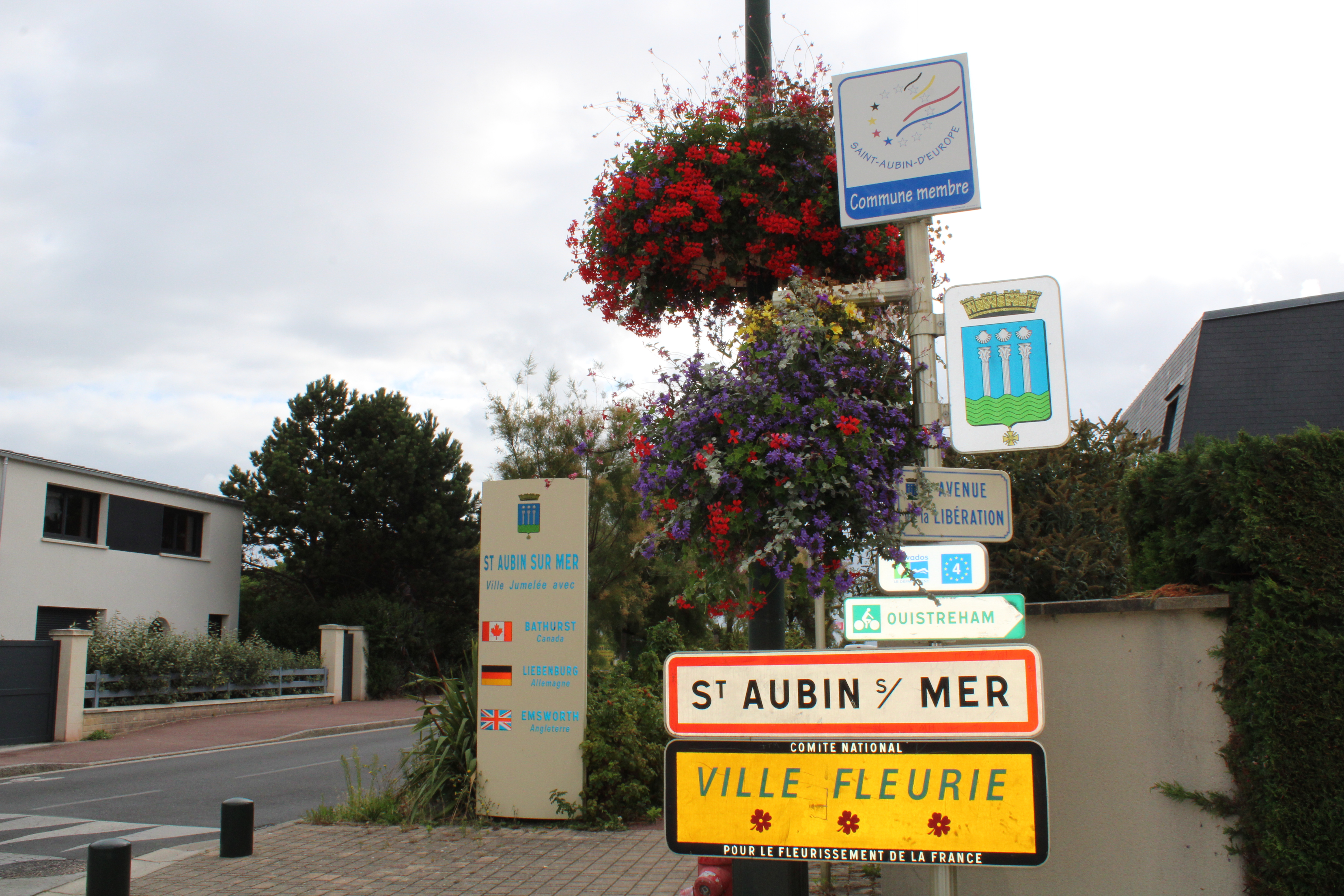 Entrée de la commune.